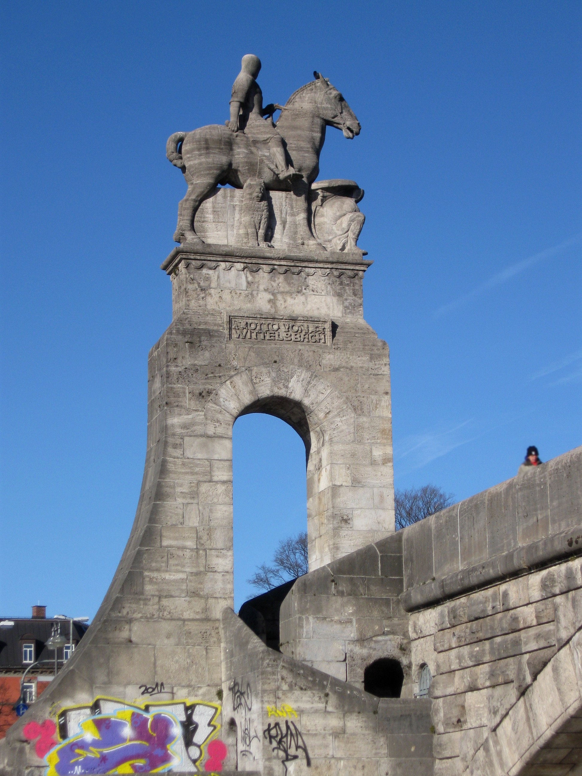 Wittelsbacherbrücke, vierbogige Steinbrücke mit Jugendstilgeländer, 1904-05 von Theodor Fischer; am westlichen Brückenpfeiler steinerner Pylon mit Reiterfigur Ottos von Wittelsbach, von Georg Wrba.